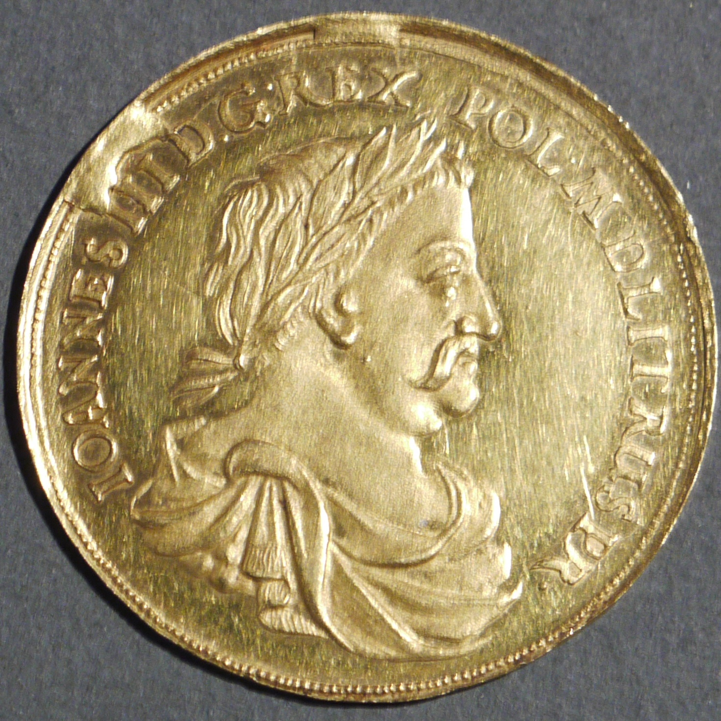 Donatywy gdańskie ze zbiorów gabinetu numizmatycznego w Malborku. Jan III Sobieski, 5-dukatowa, b.d.